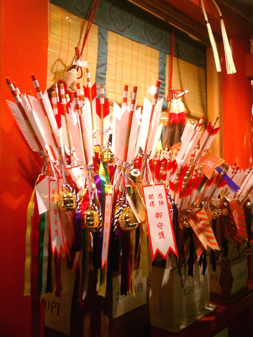 Hamaya